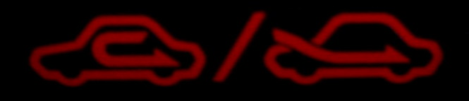 Umlufttaste im Pkw